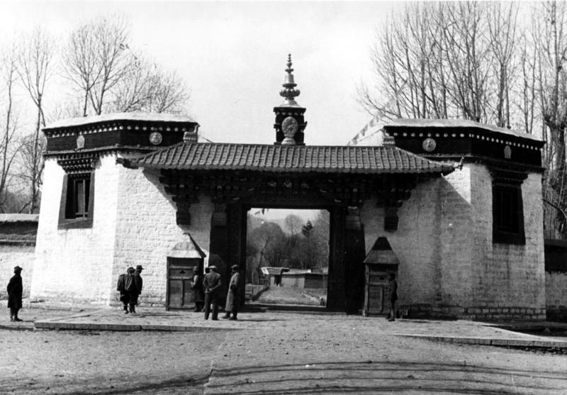 Lhasa, Eingangsportal